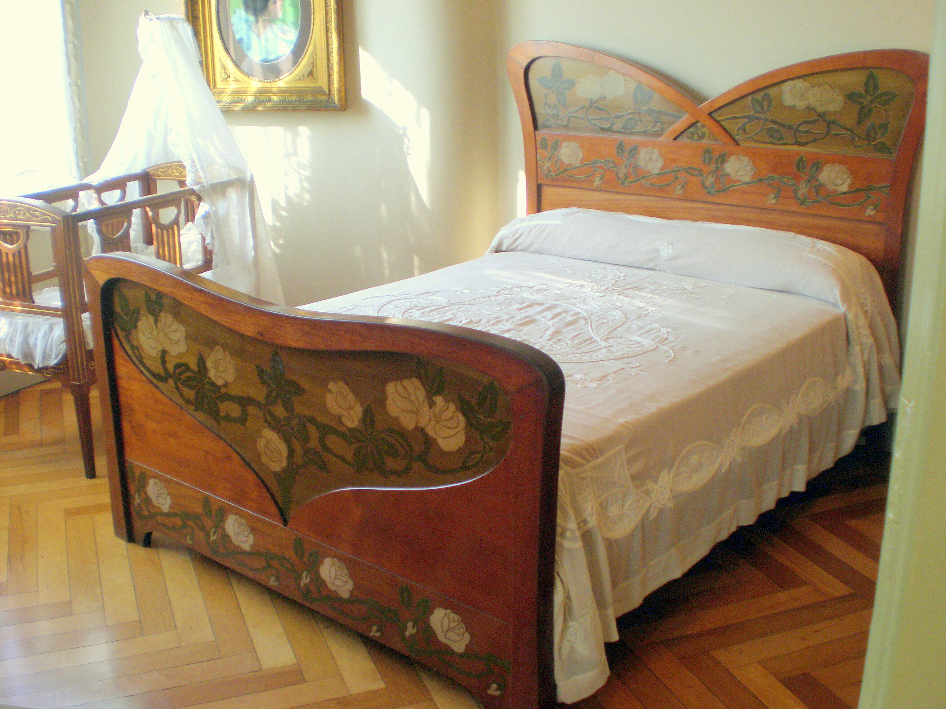 Barcelona - La Pedrera. Habitació.